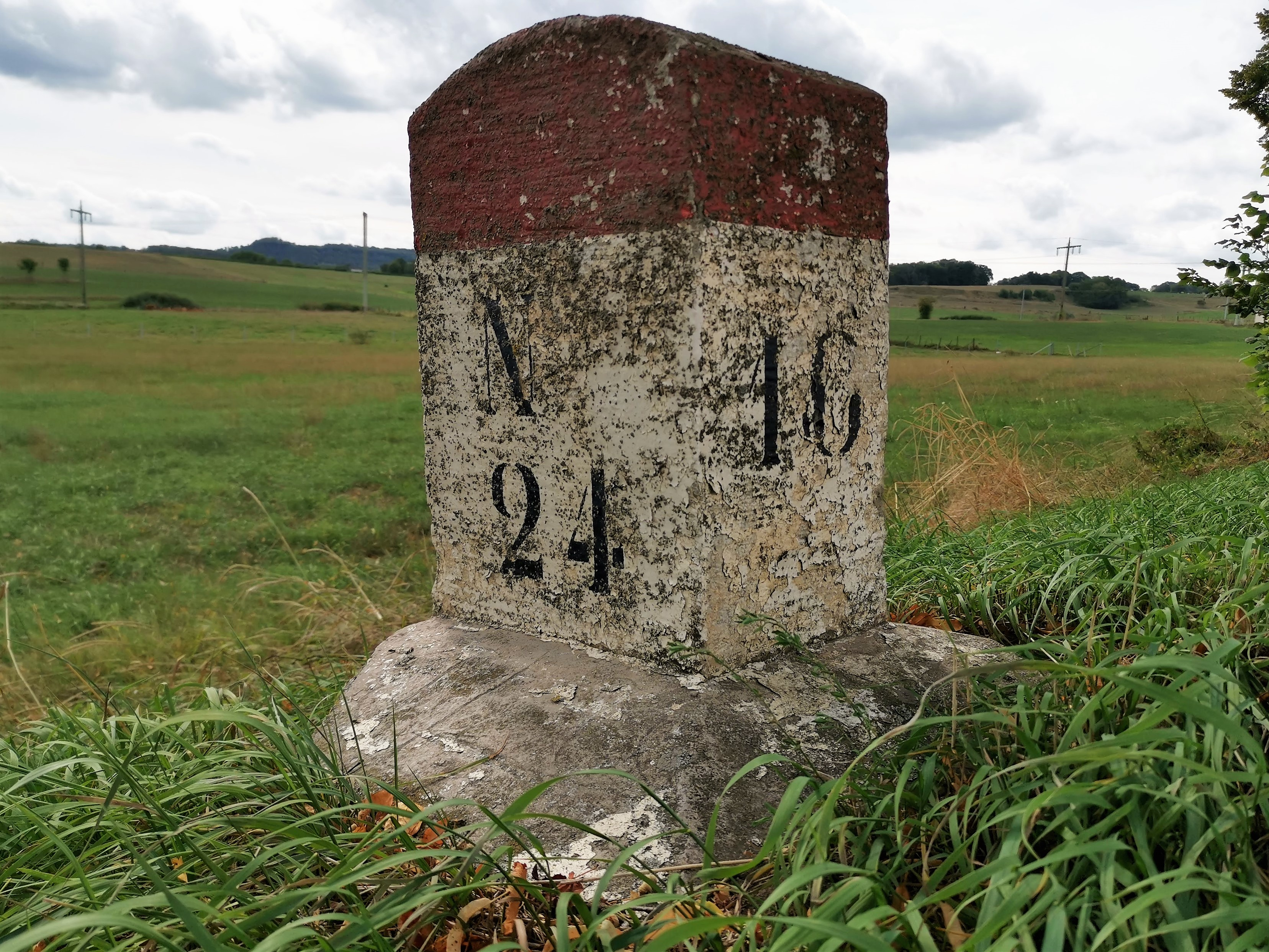 Borne kilométrique N24 entre Rippweiler-Barrière et Useldange.